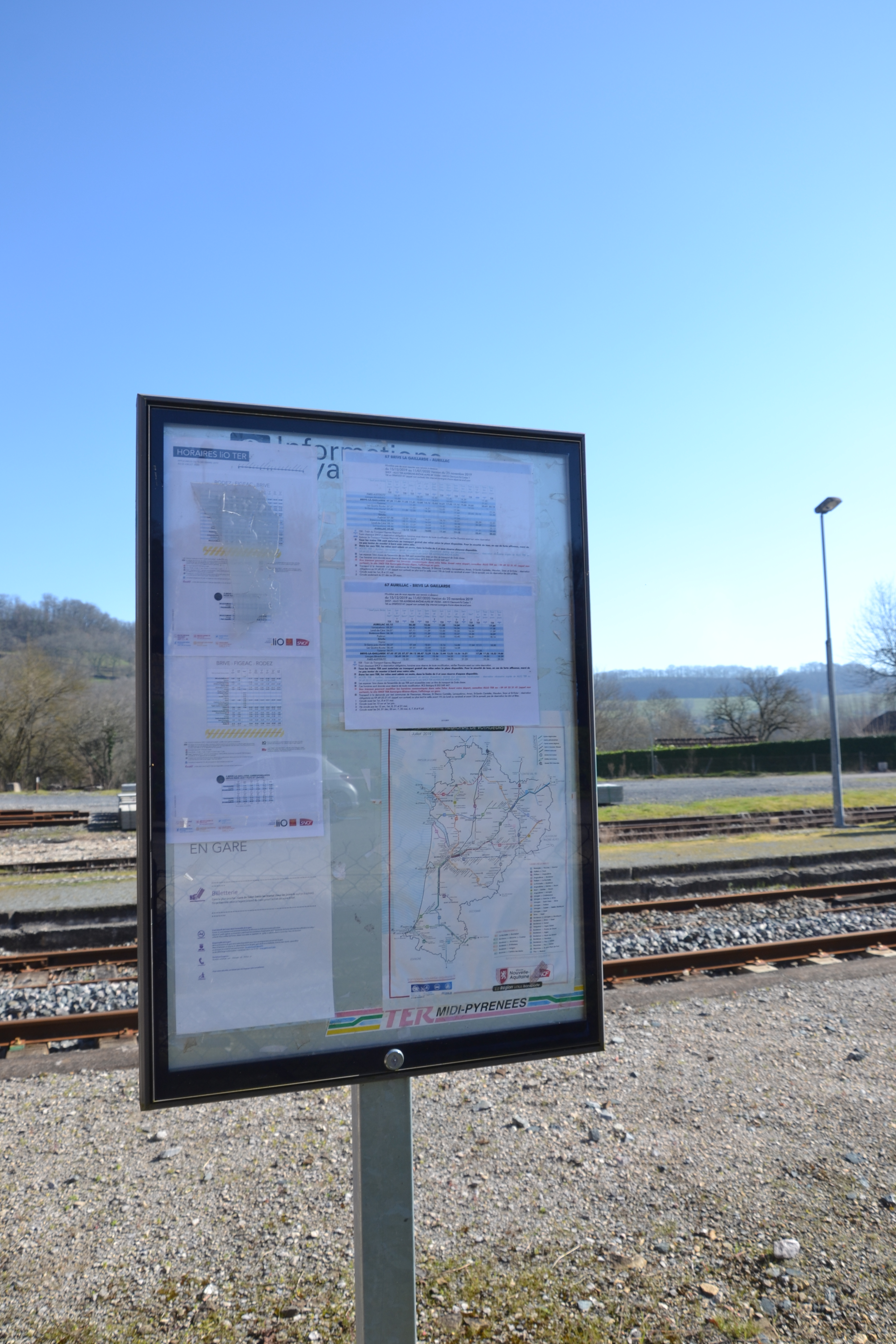 quartier de la gare à Turenne, en Corrèze